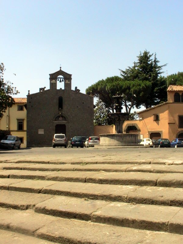 Viterbo, Lazio, Italia